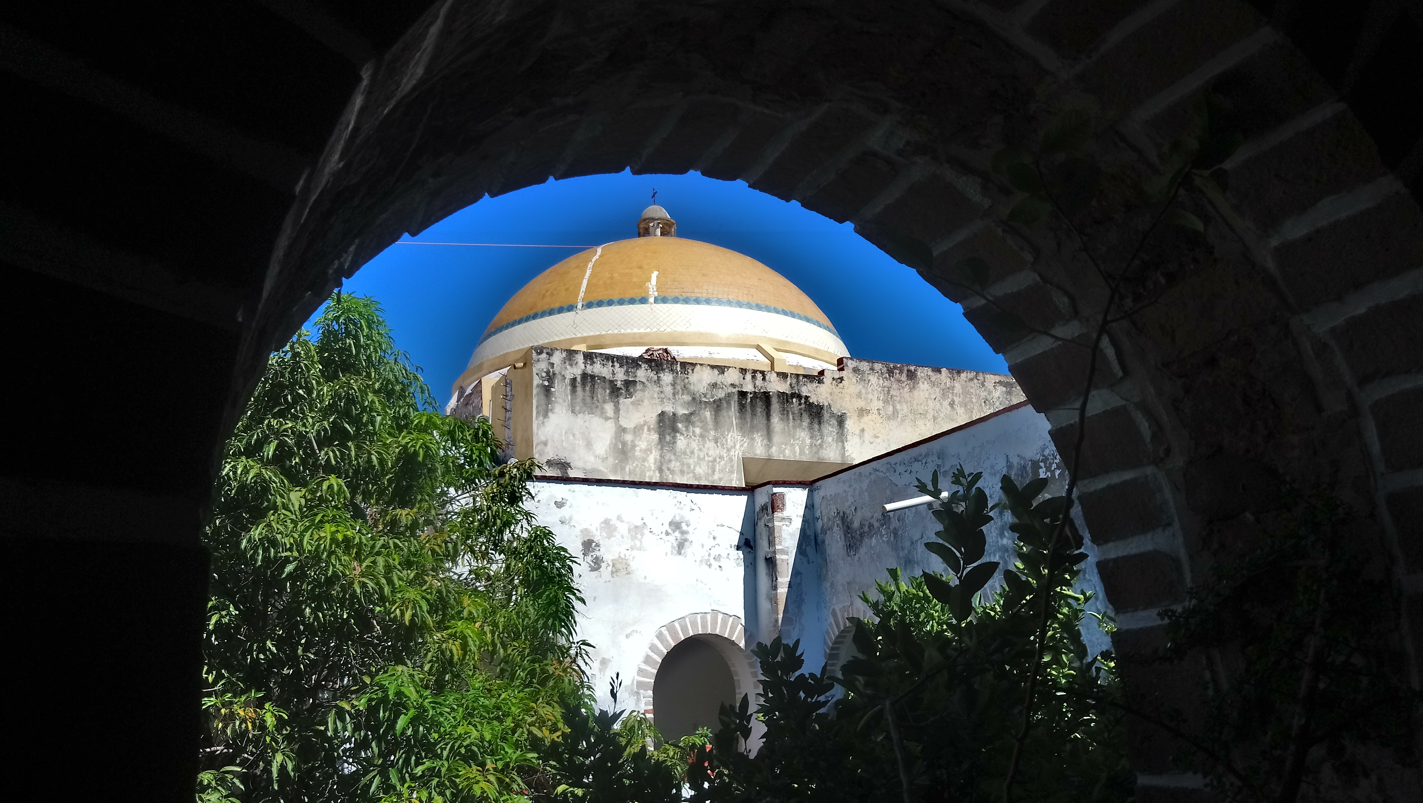 Vista una tarde al final del verano 2018